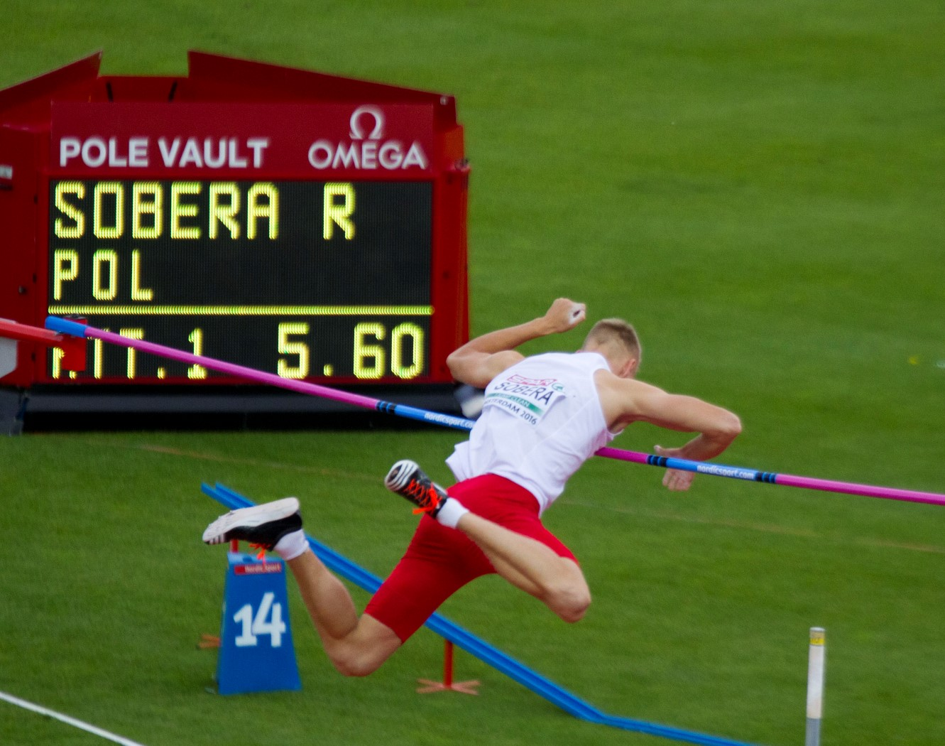 5170 sobera polsstok finale